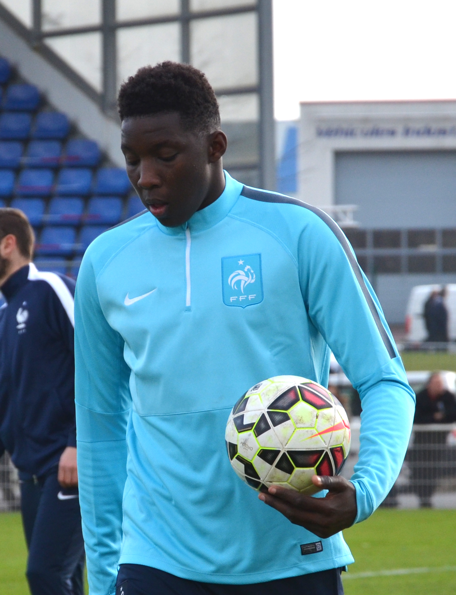 Photographie prise lors du match opposant la France à l'Angleterre pour les qualifications du championnat d'Europe de football des moins de 19 ans 2015 au stade Louis-Villemer de Saint-Lô le 31 mars 2015. Ici, Bingourou Kamara.